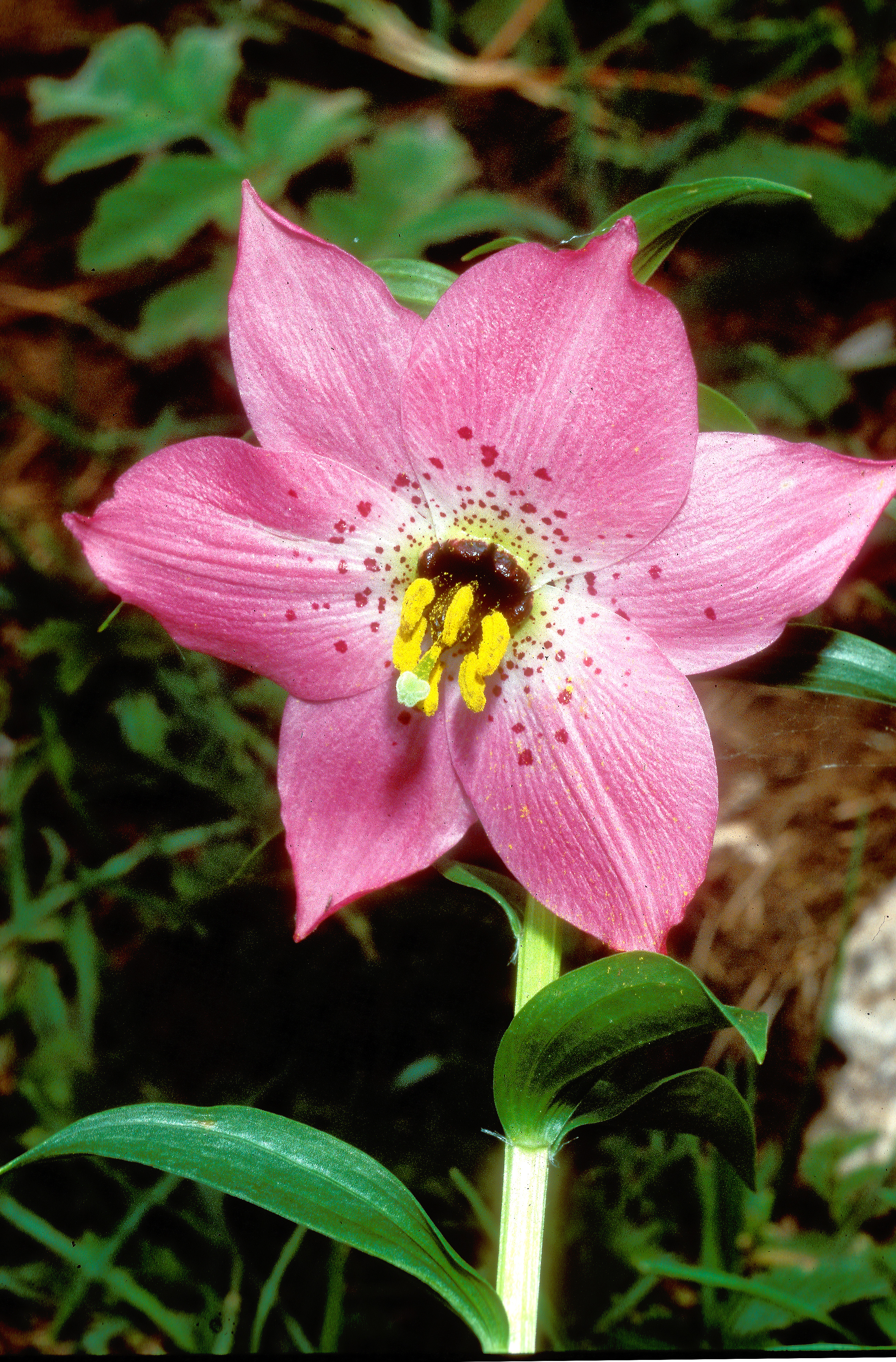 Nomocharis aperta in habitat, Napa Hai, Yunnan, China